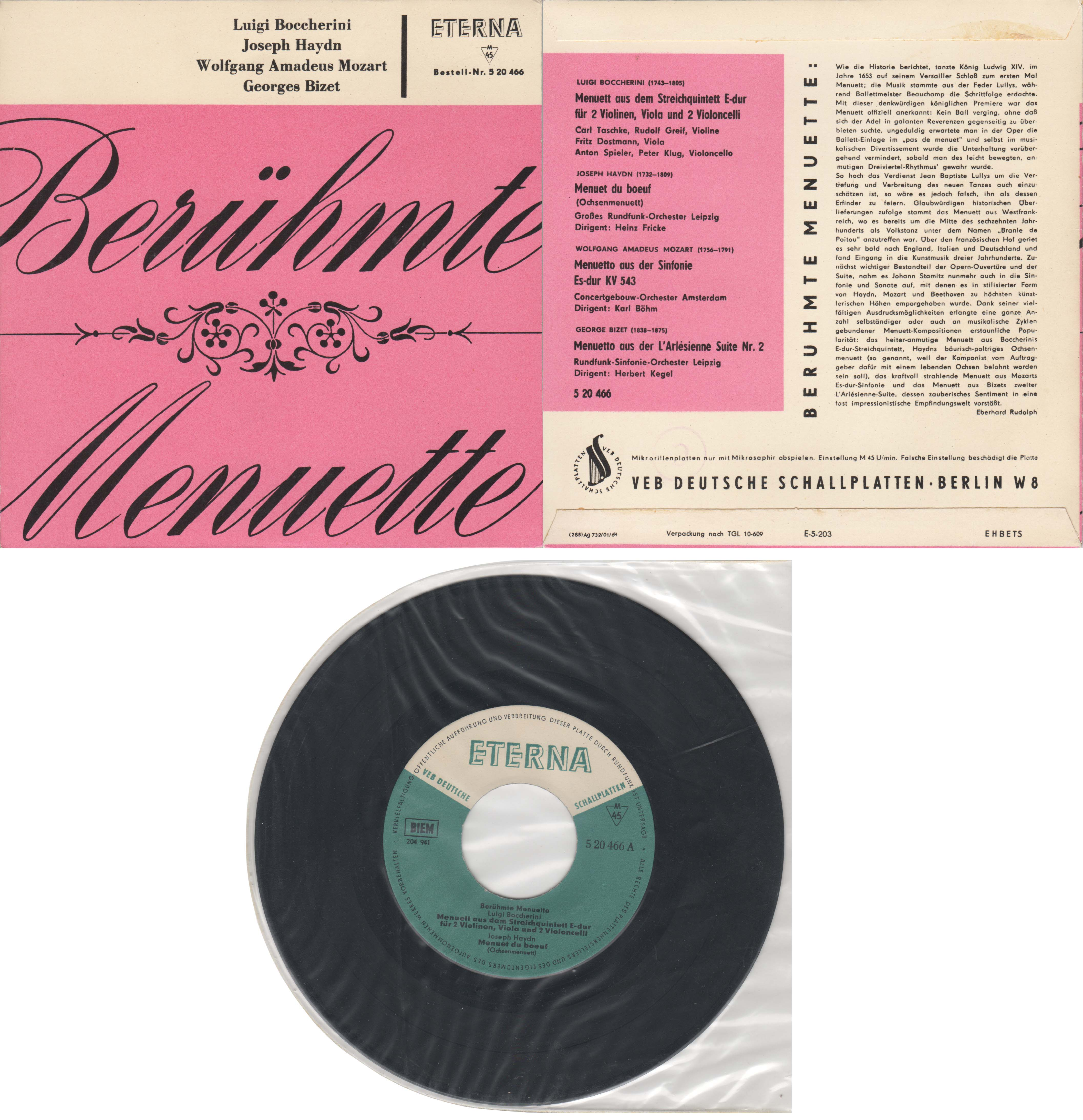 7-Zoll-(17,5-cm)-Schallplatte mit berühmten Menuetten aus den 60er Jahren sowie Hülle mit Vorder- und Rückseitenansicht